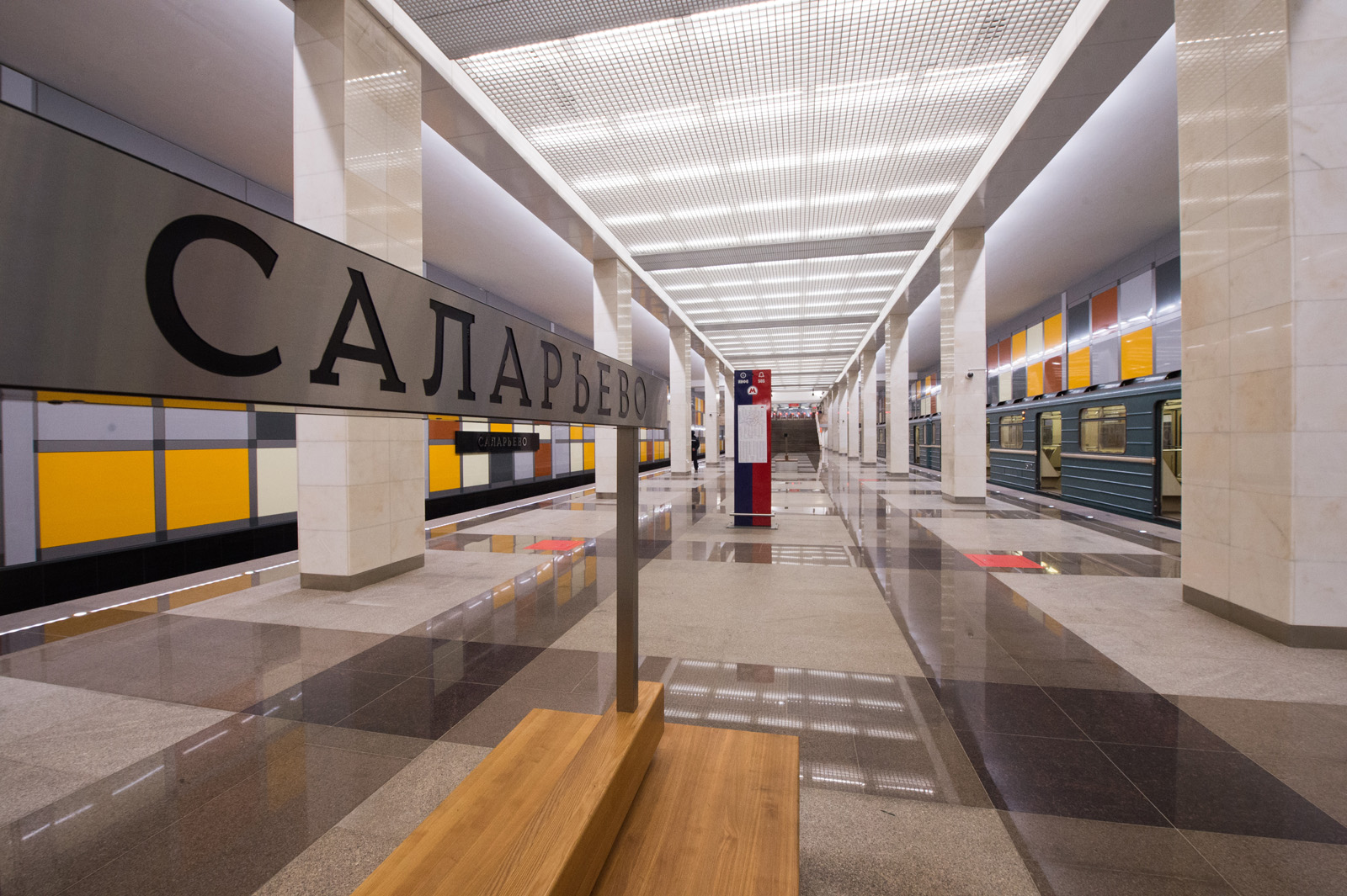 Холл станции Саларьево